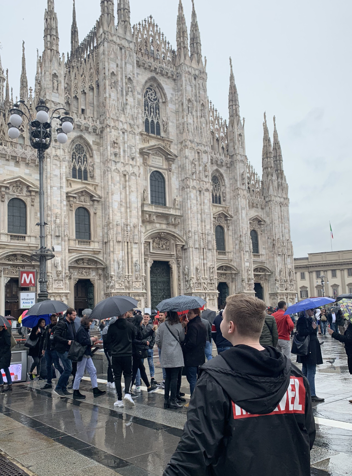 Immagine rappresentante l'autore Vincenzo Pignetti (Vincent P.) in Piazza Duomo a Milano